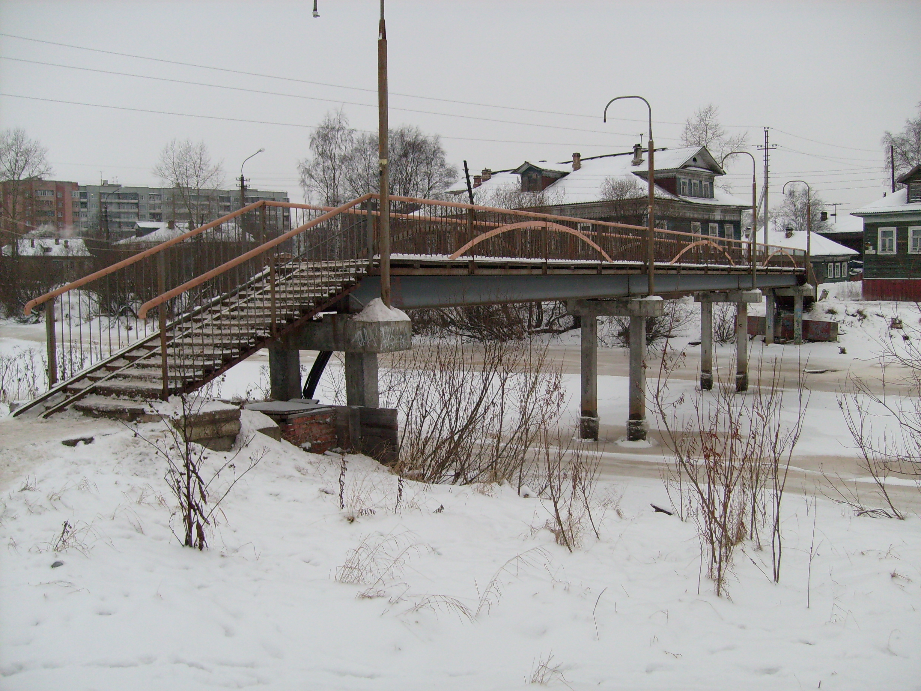 Один из мостов пешеходных через реку Соломбалку в Архангельске